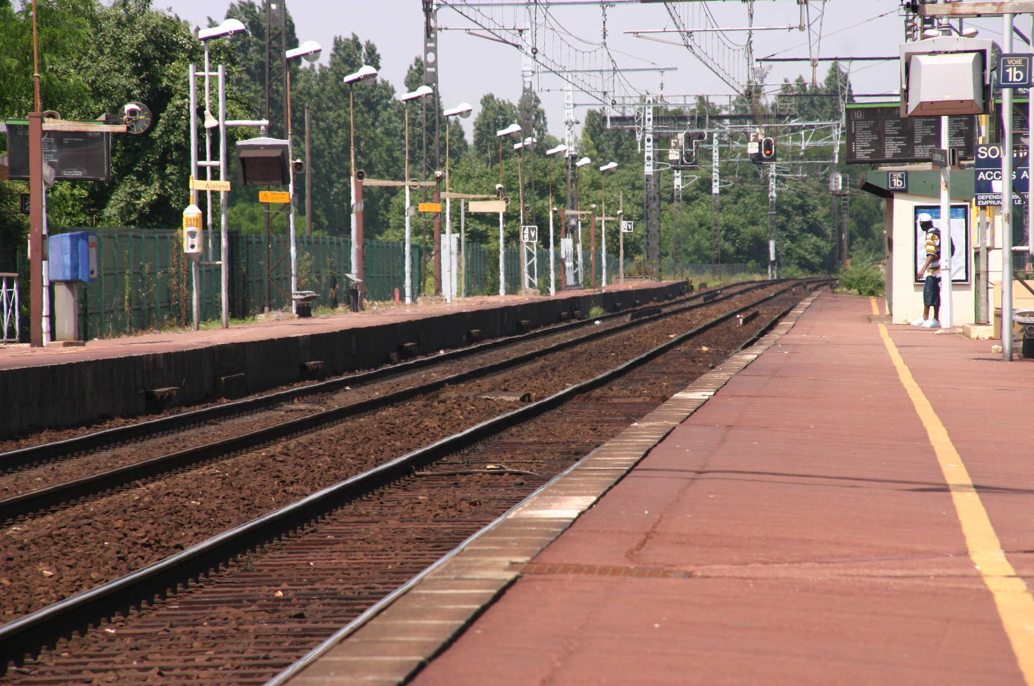 La Gare de Villeneuve-Prairie, Choisy-le-Roi , département du Val-de-Marne, France